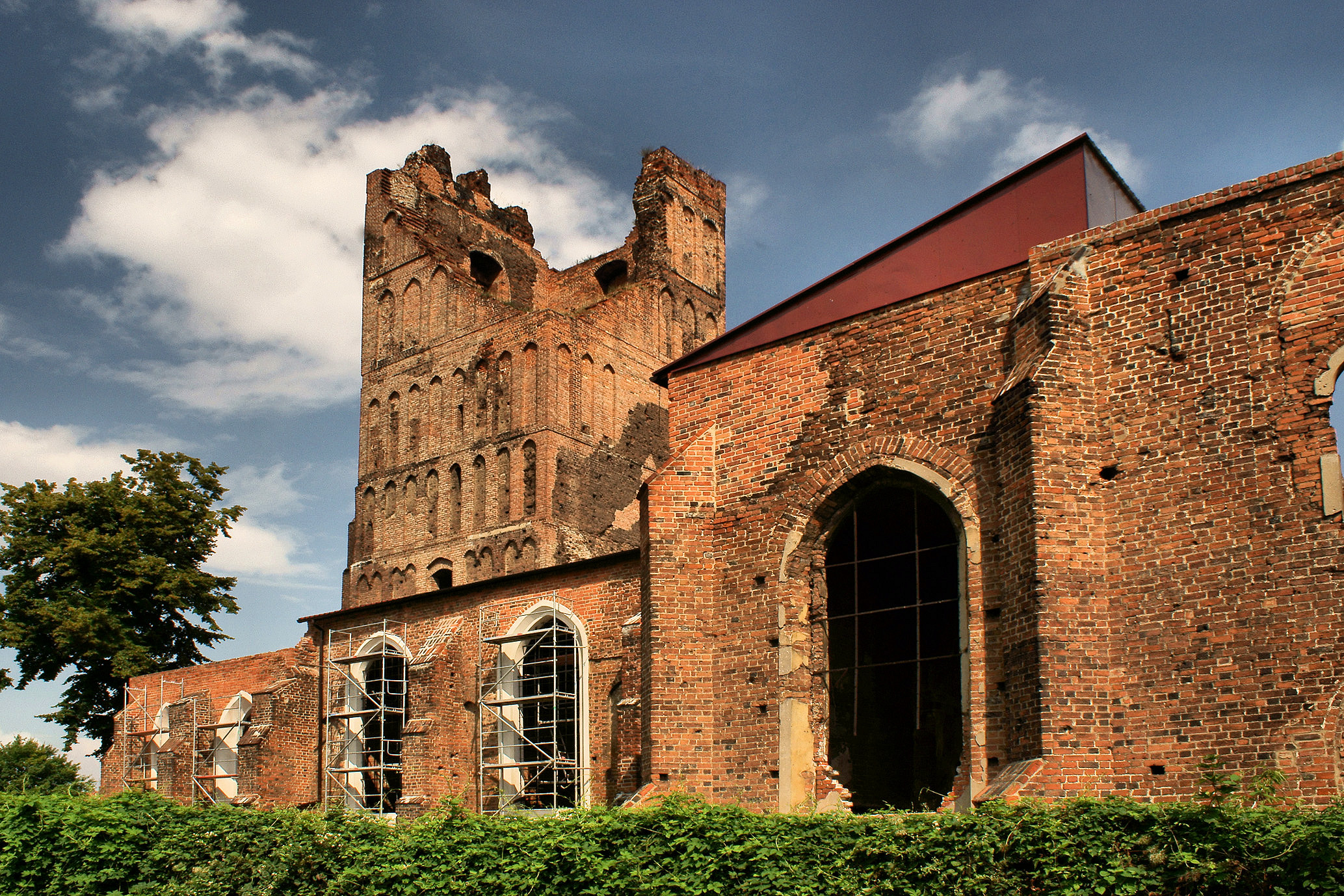 Kościół parafialny św. Mikołaja Głogów, ul. Parafialna